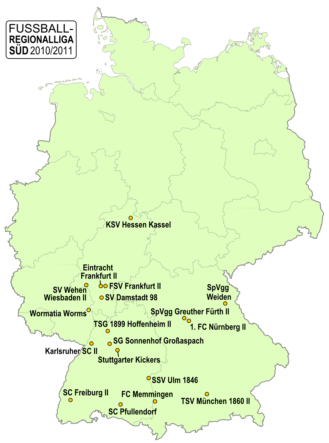 Karte der Vereine der Fußball-Regionalliga Süd, Saison 2010/2011